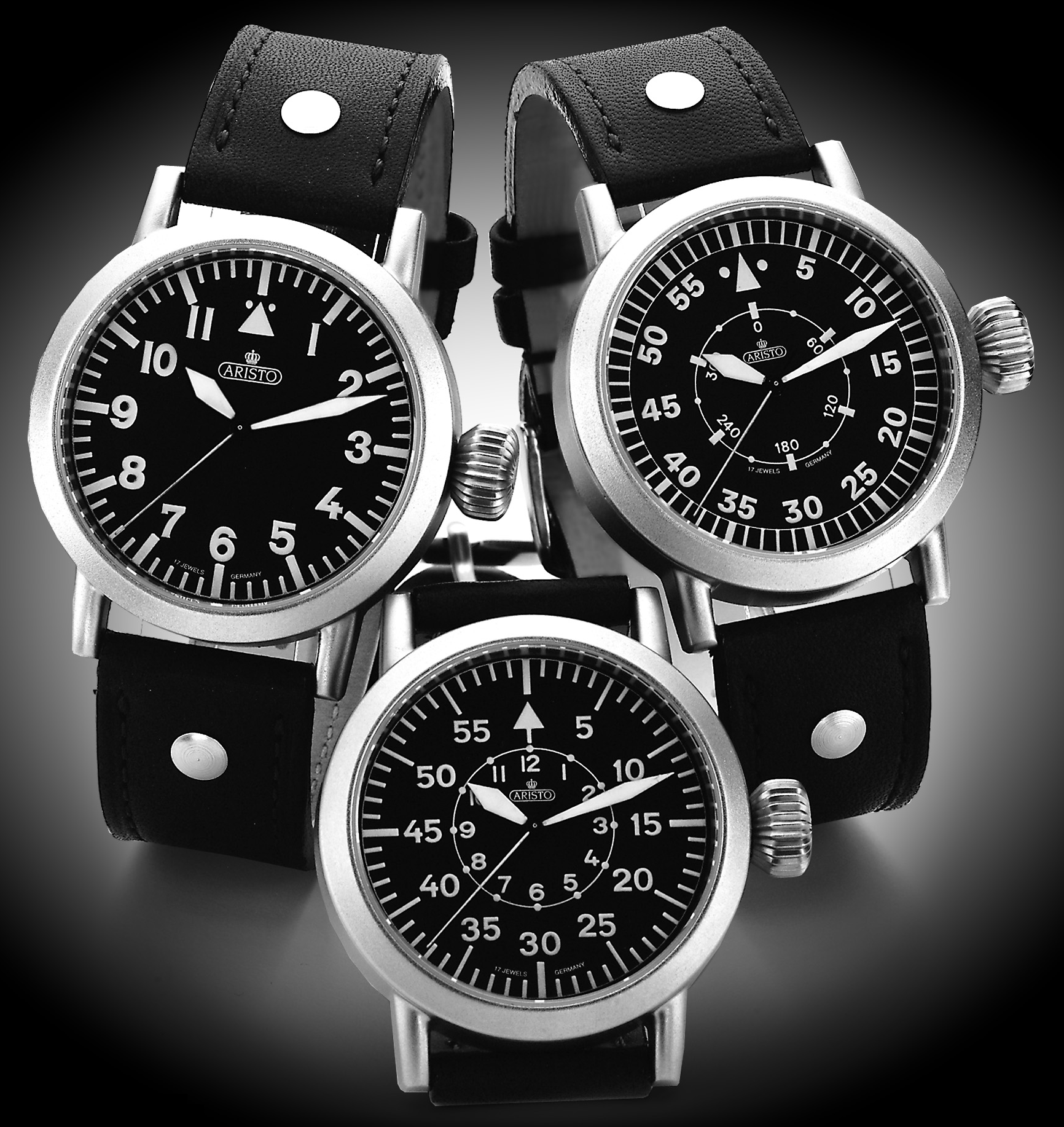 Aristo Modellreihe "Beobachter" in 44mm, mit Zwiebelkrone, an Militär-Beobachtungsuhren des 2. Weltkriegs angelehnt